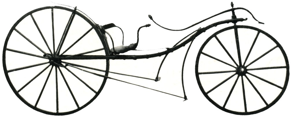 Bicycle Type Macmillan, Macmillans Hinterradstangenantrieb Rad